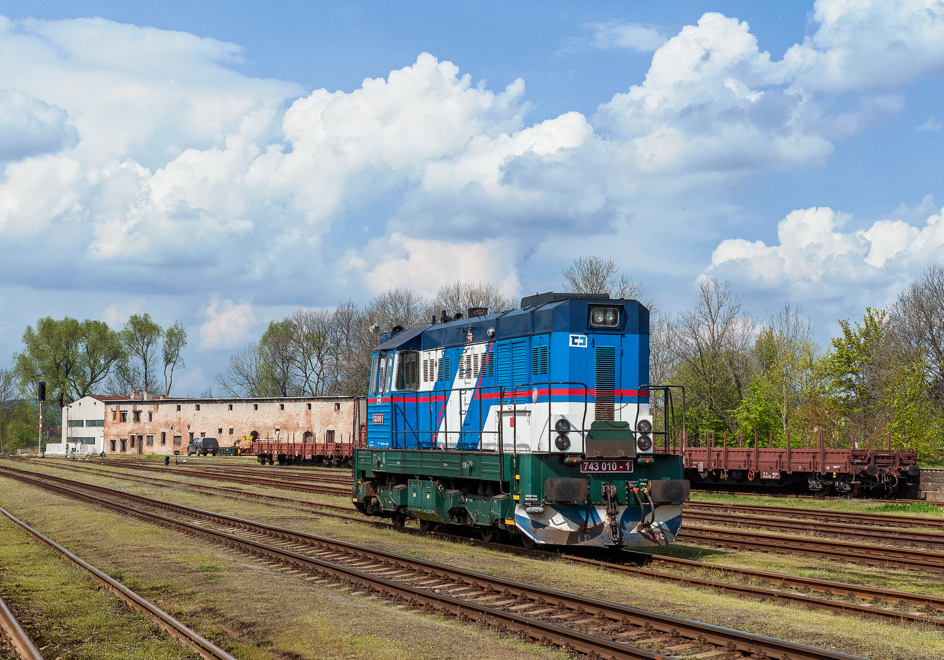 Motorová lokomotiva 743.010 firmy ČD Cargo v Liberci.